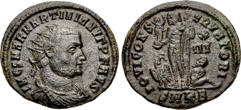 Fólis de Marciniano cunhado em Cízico em 324. Oficina 2